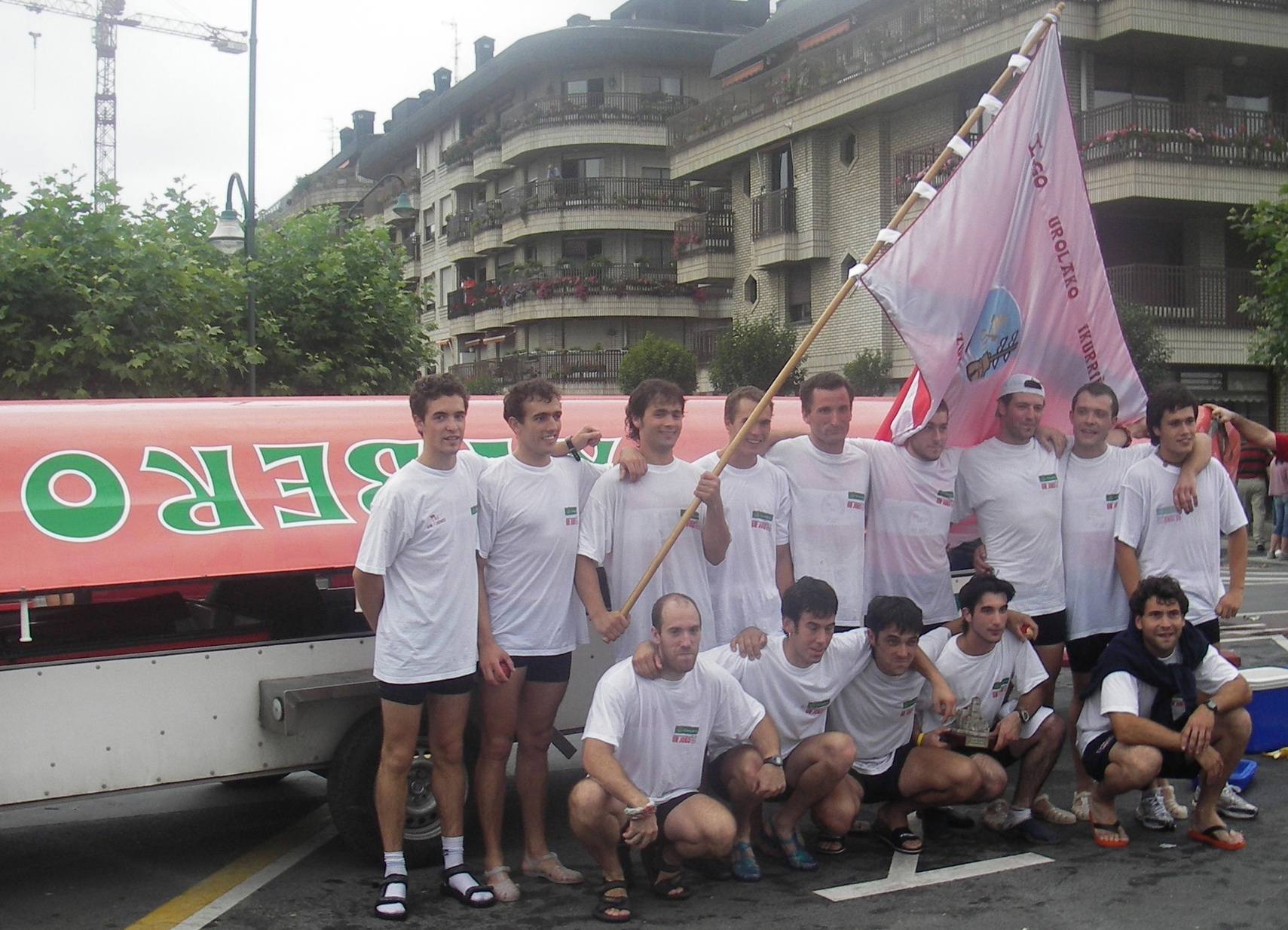 Trainière du club Ur Joko de Saint-Jean-de-Luz (Pyrénées-Atlantiques) lors du Drapeau de Zumaia (Guipuscoa).